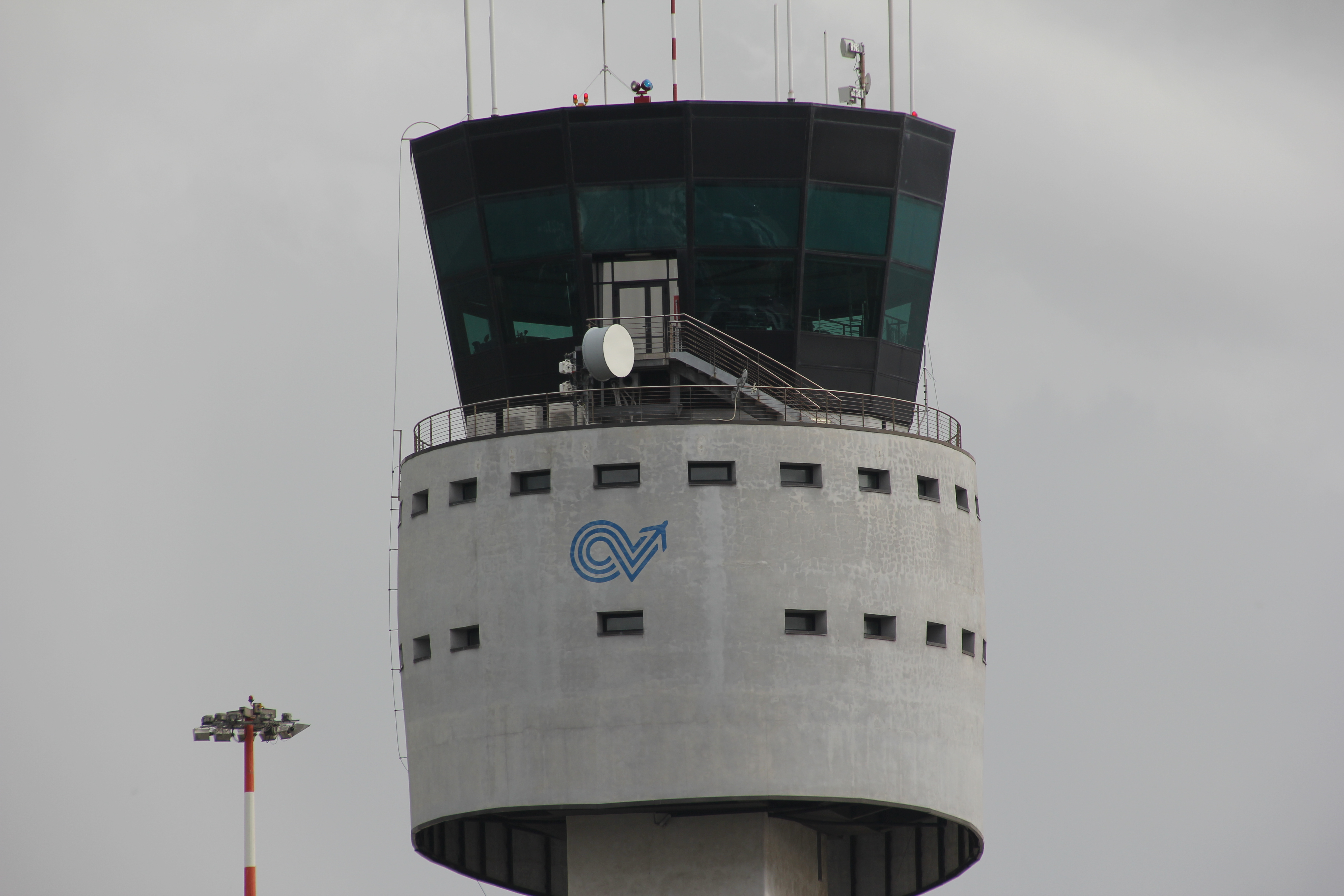 Olbia, aeroporto di Olbia-Costa Smeralda